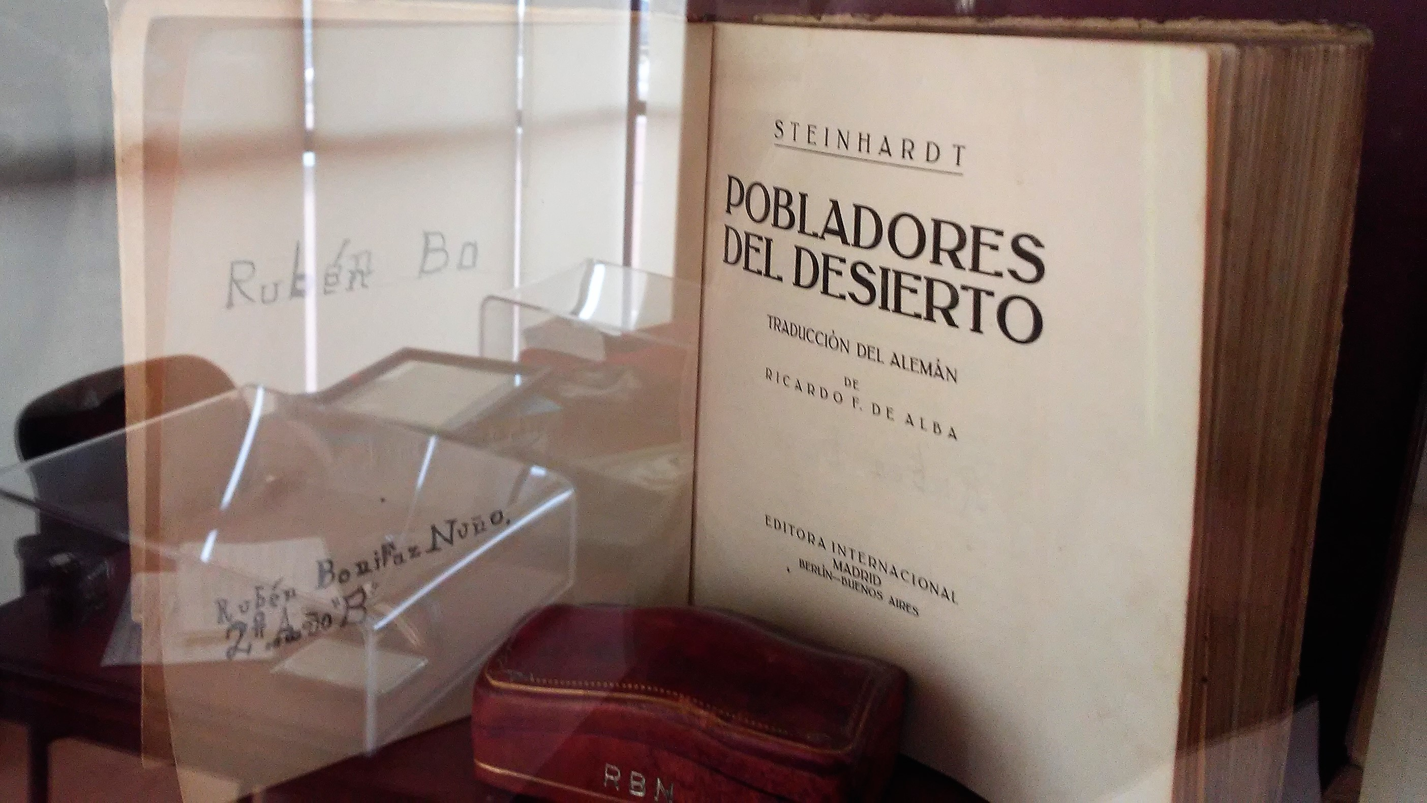 Uno de los libros de la infancia de Rubén Bonifaz Nuño.